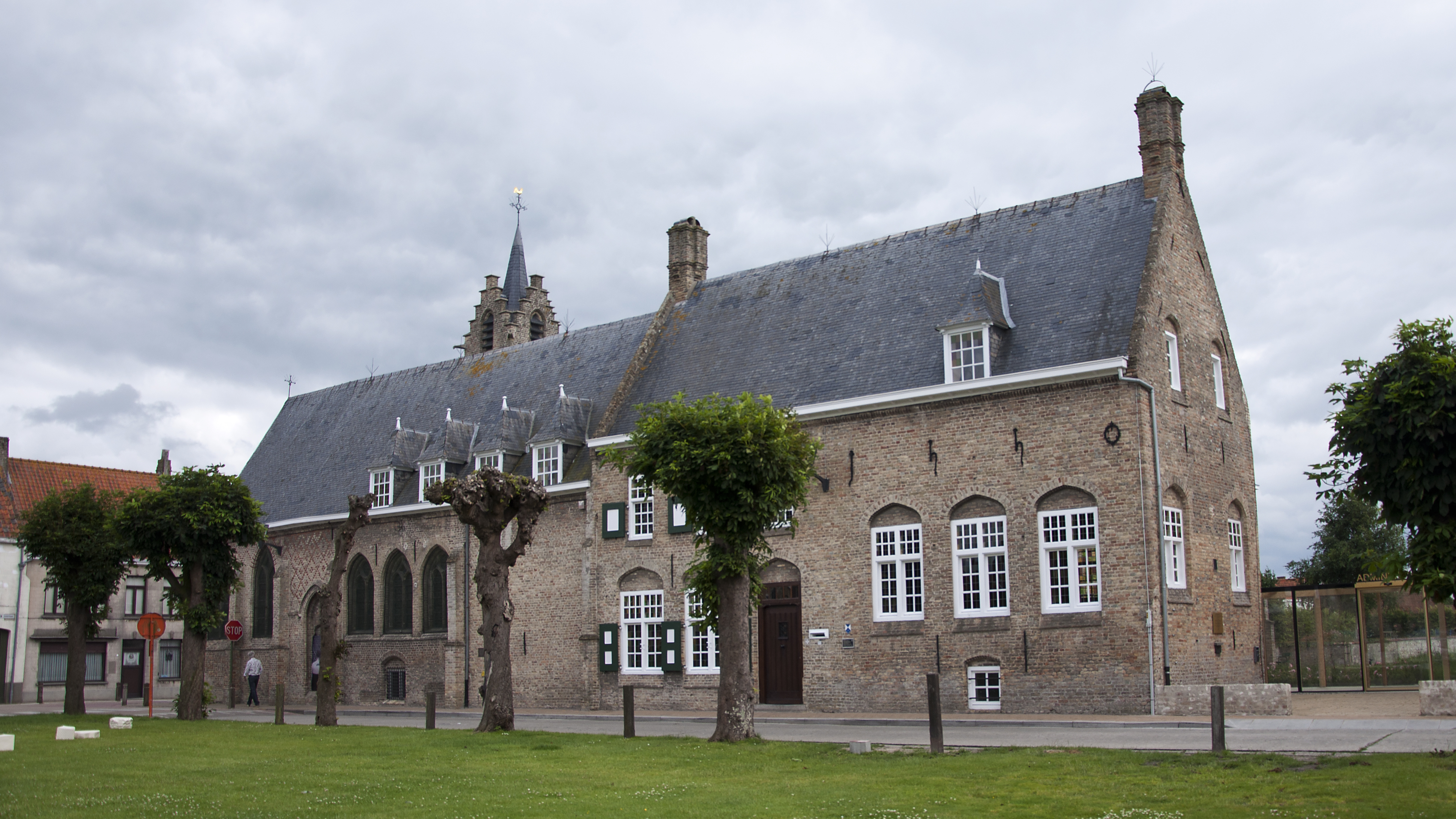 Het voormalig klooster van de grauwzusters te Lo, België. Sedert mei 2012 gemeentehuis van Lo-Reninge.